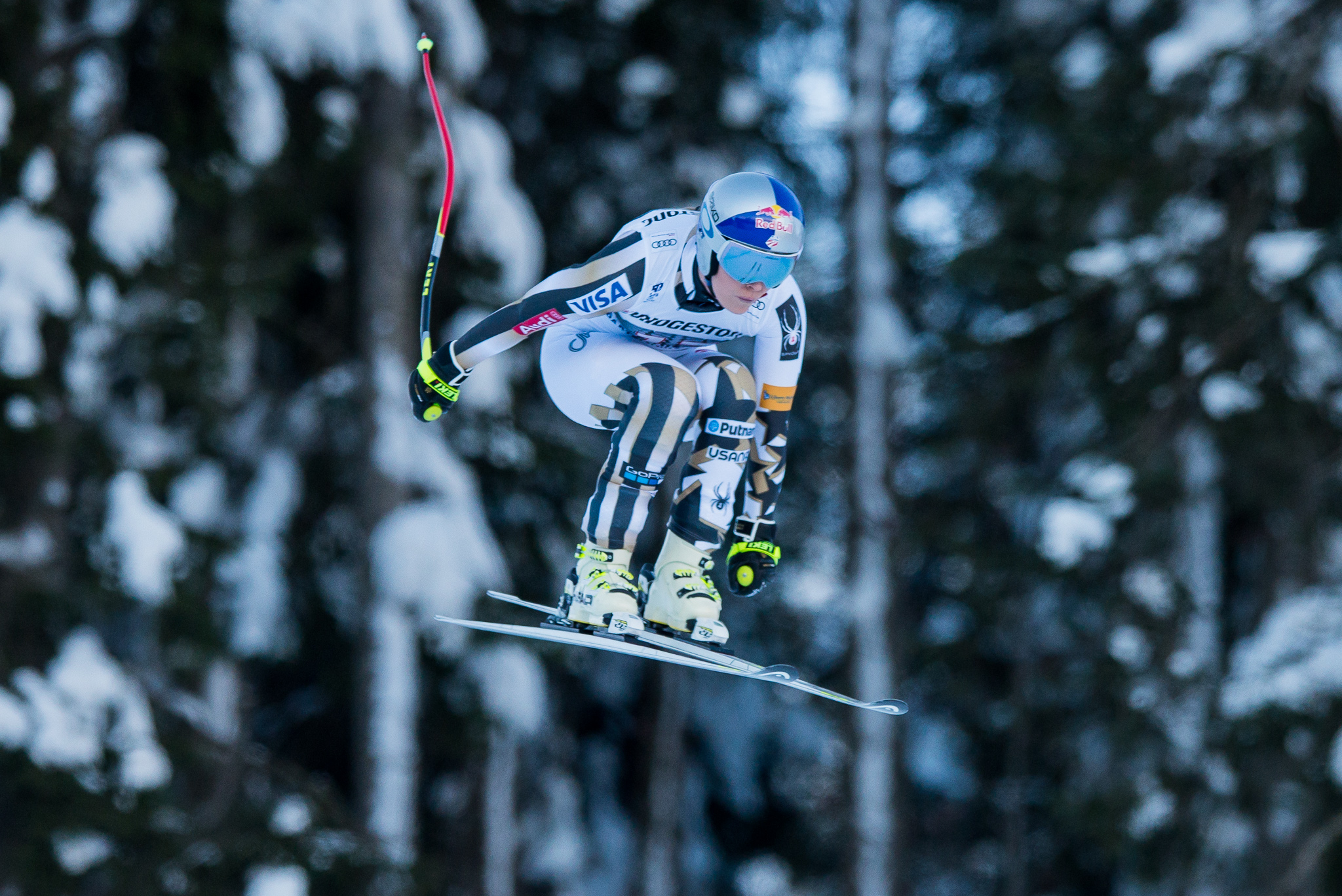 64. Kandahar Rennen,Audi FIS Ski Weltcup Garmisch-Partenkirchen,Damen Abfahrt,Kandahar,Ladies Downhill,Lindsey Vonn